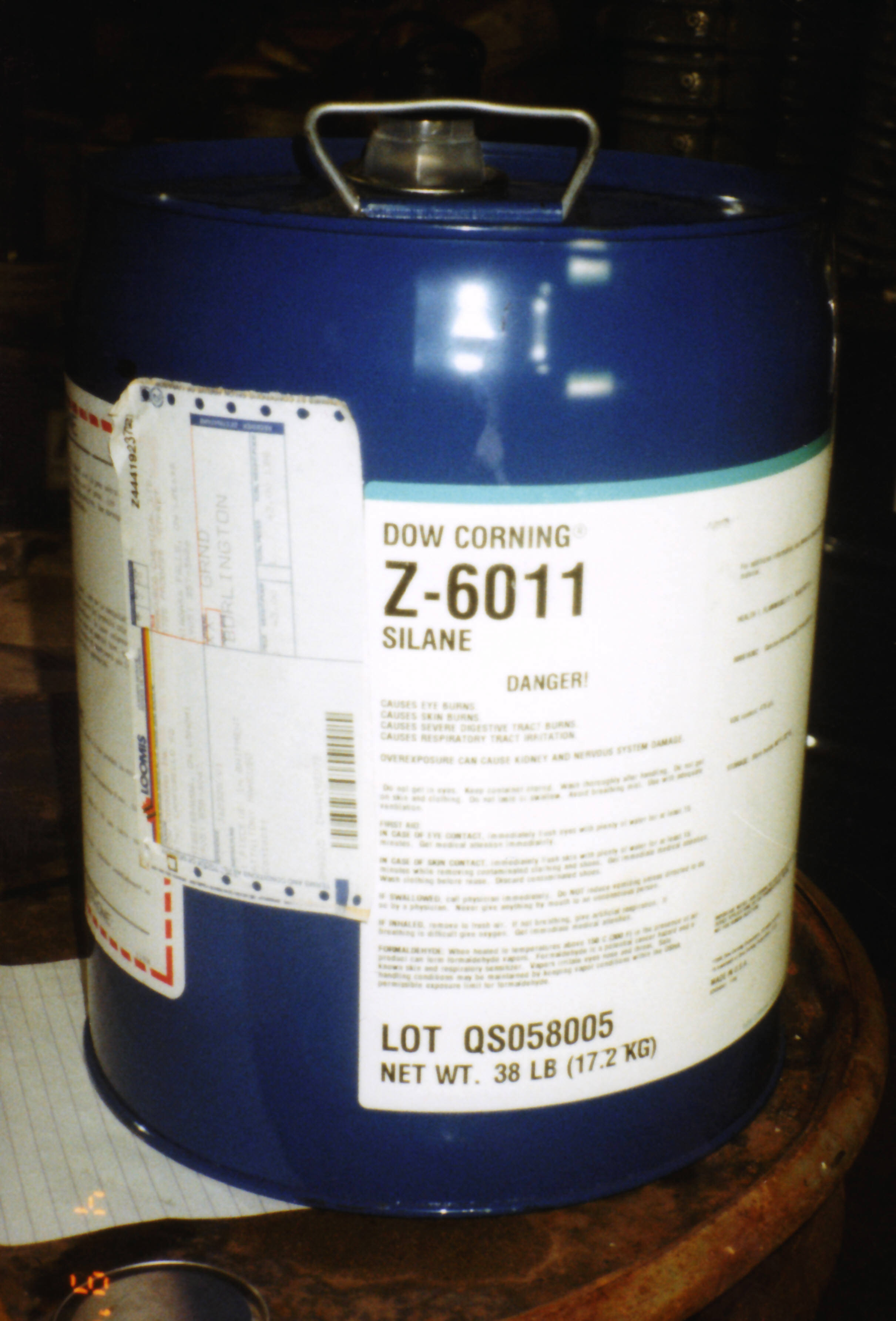 Steel silane container